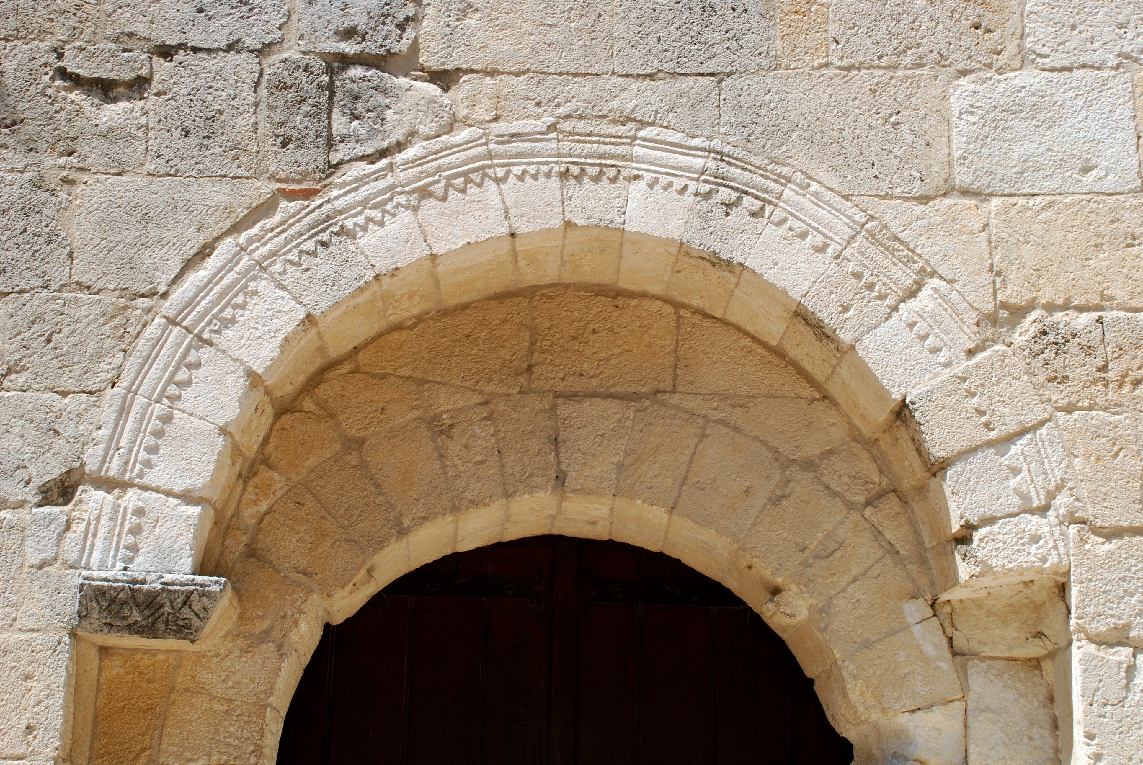 France - Gard - Saint-Amand de Théziers